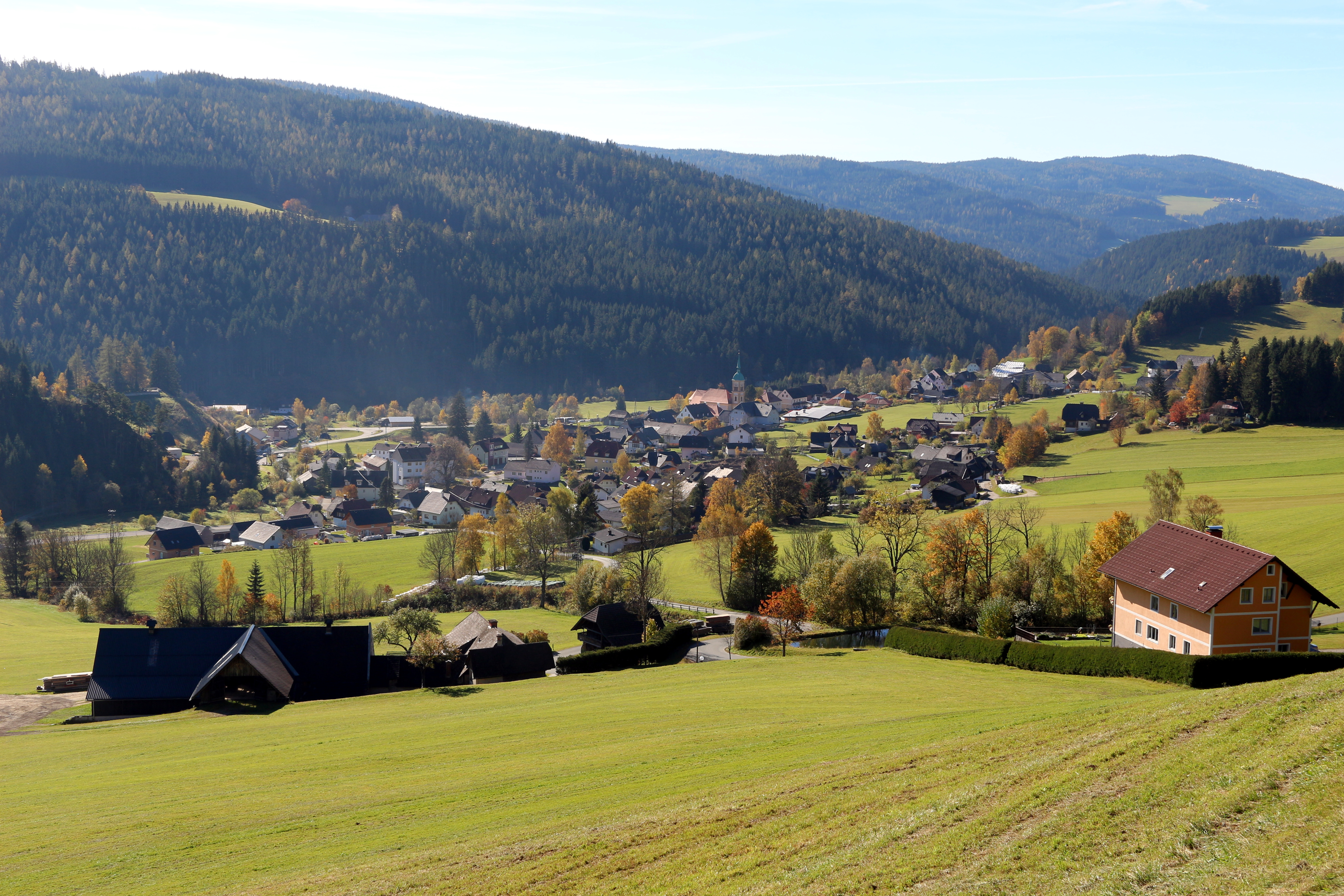 Ortsansicht von Rettenegg in der Steiermark (Blickrichtung Süden).